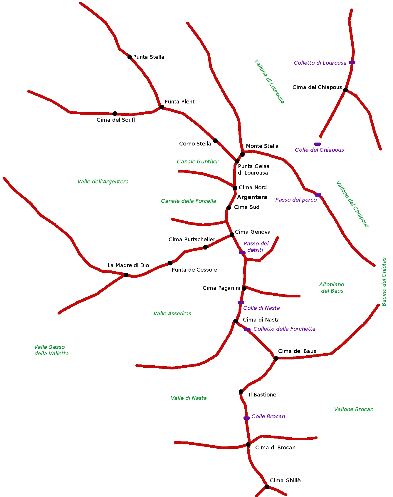 Schema morfologico del massiccio dell'Argentera. In rosso le creste; in violetto i passi; in nero le punte principali.